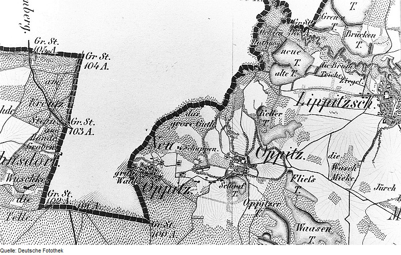 Original image description from the Deutsche Fotothek Königswartha-Oppitz. Oberreit, Sect. Bautzen, 1844/46